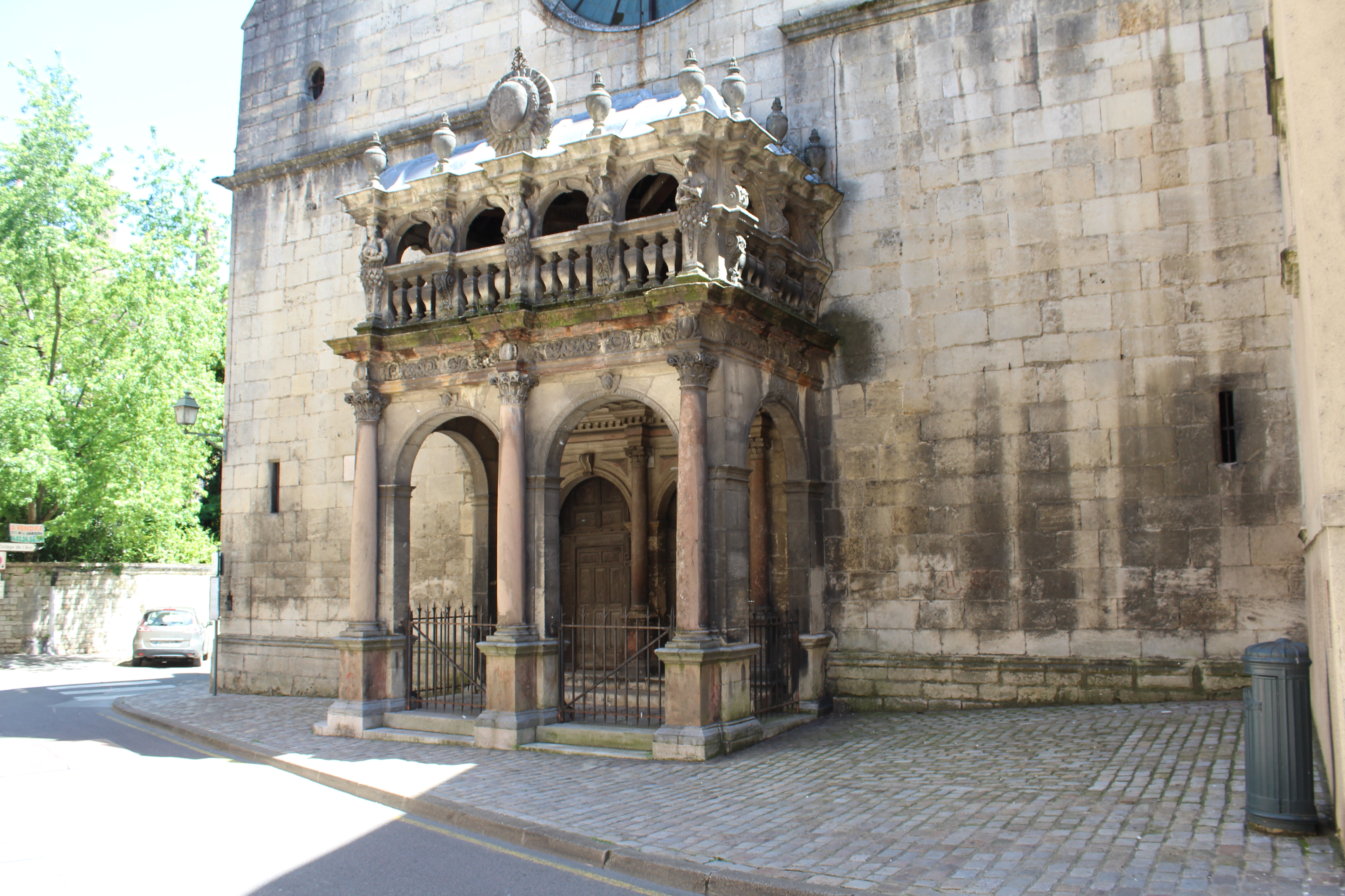 Chapelle des Jésuites, Dole.